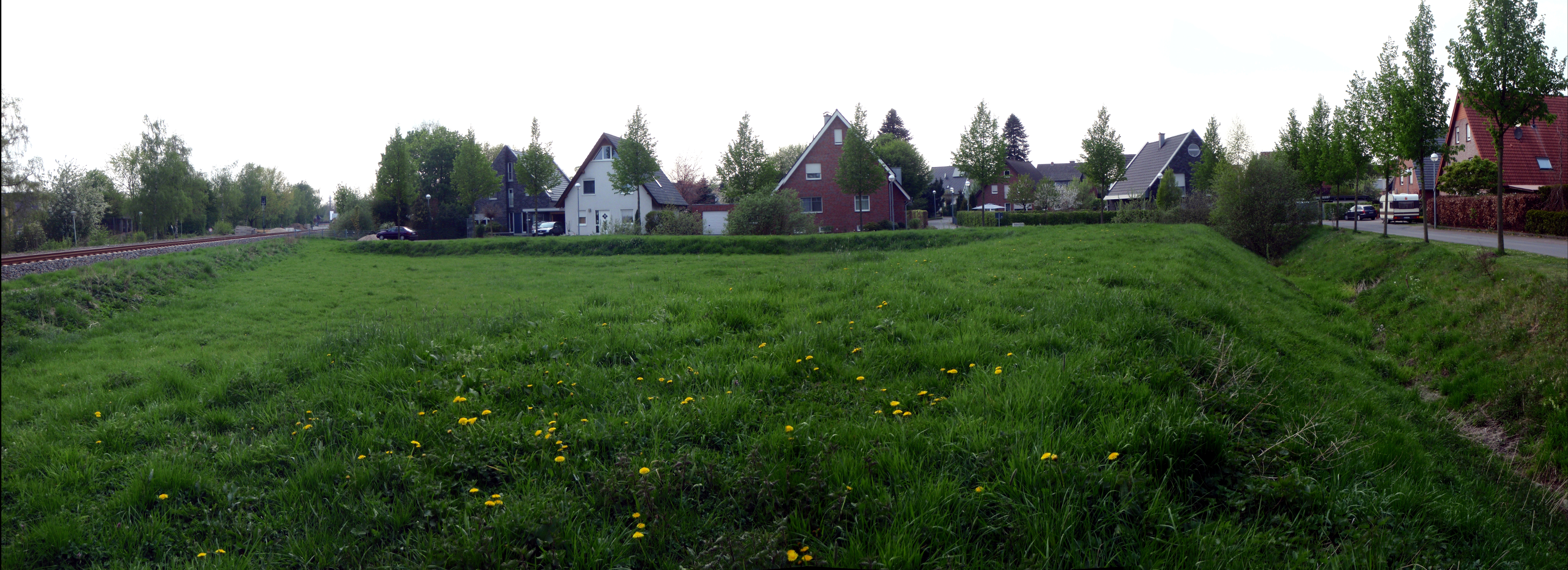 Das St.-Johannes-Ravelin ist eines der wenigen im Stadtbild noch erhaltenen Relikte der früheren Ludgerusburg in Coesfeld (Westfalen). Jenseits der im Bild sichtbaren Bahnstrecke Coesfeld - Münster befand sich das Zentrum der sternförmigen Zitadelle, die ab 1654 von Fürstbischof Christoph Bernhard von Galen gebaut wurde. Nie vollständig vollendet, wurde die Festung bereits 1888 von den Nachfolgern des Landesfürsten geschleift.